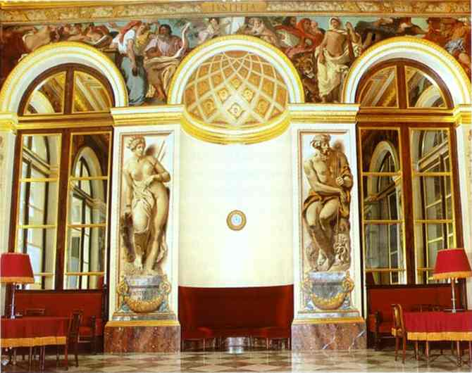 Фрески на западной стене